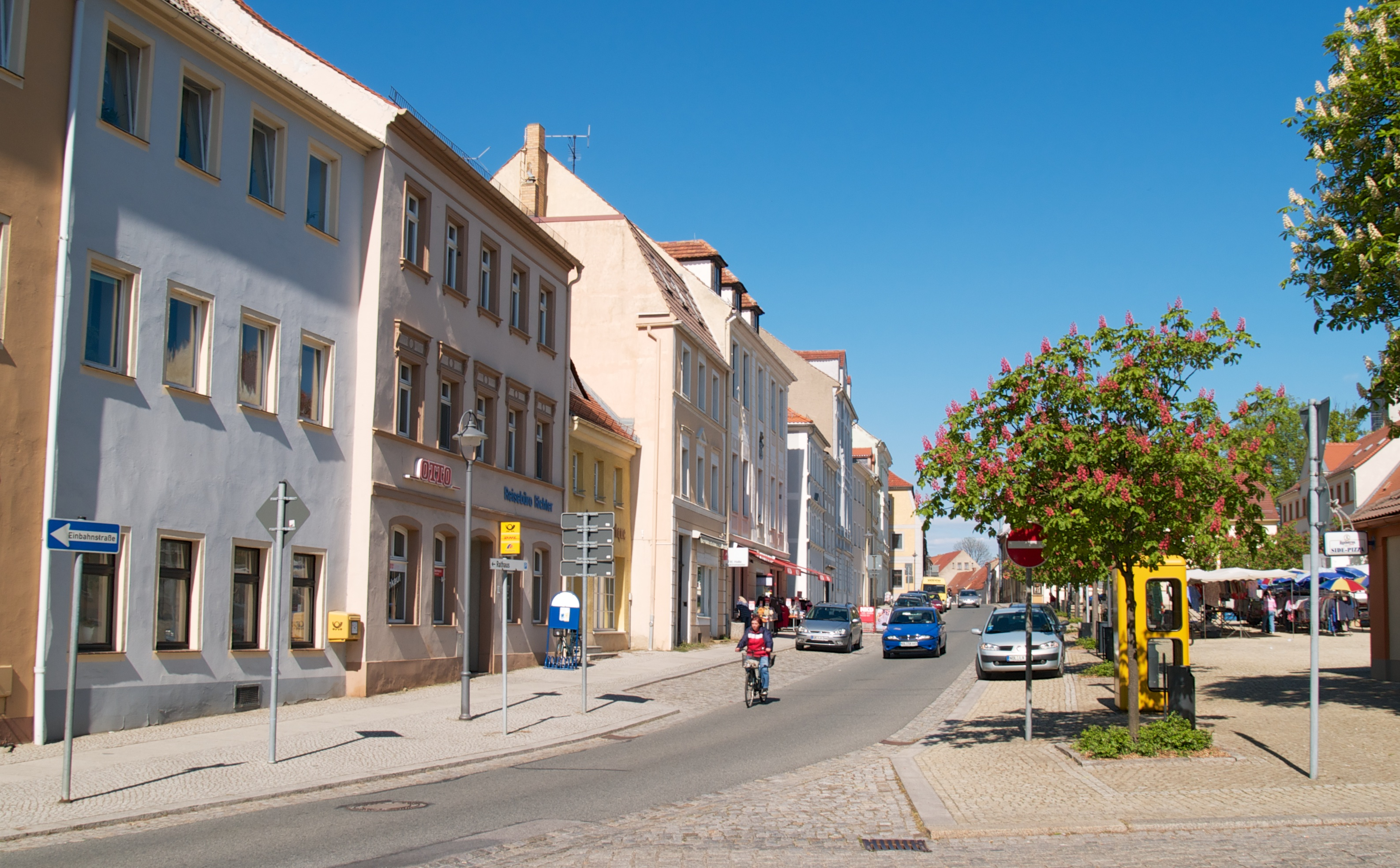 Reichenbach OL Markt